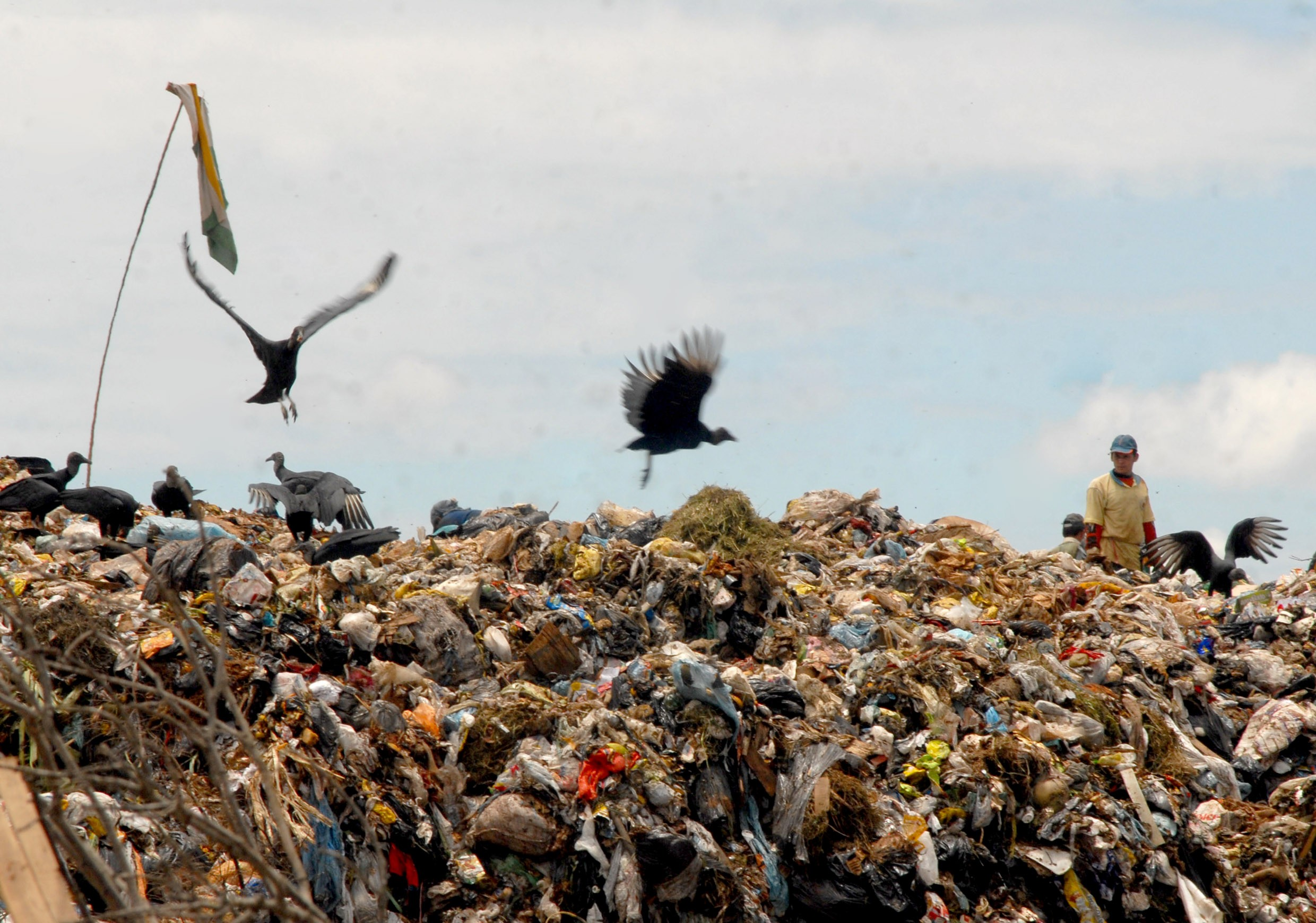 Urubus no Lixão da Cidade Estrutural, DF-BR